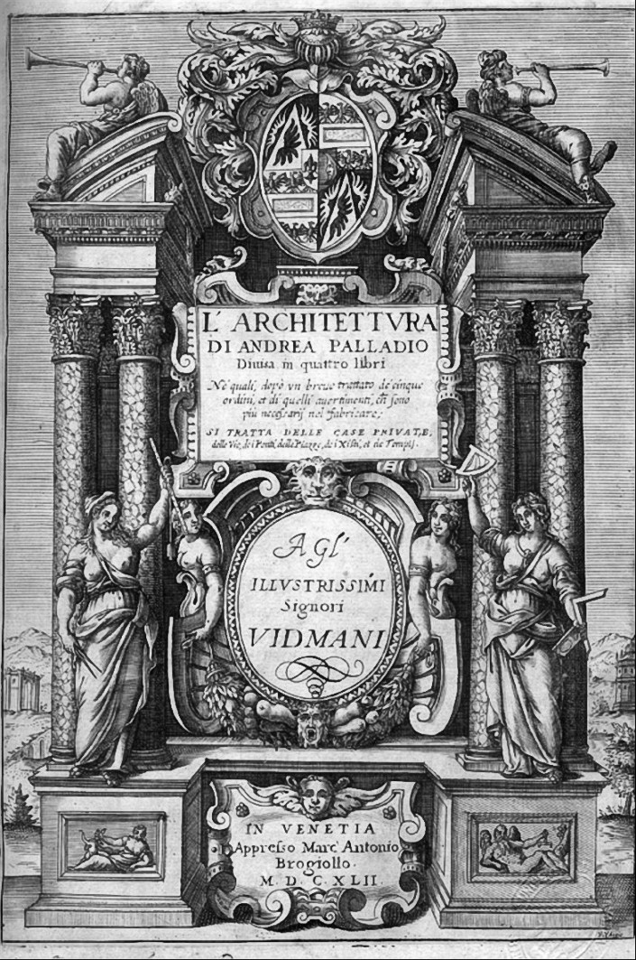 issue 1642. Front page.